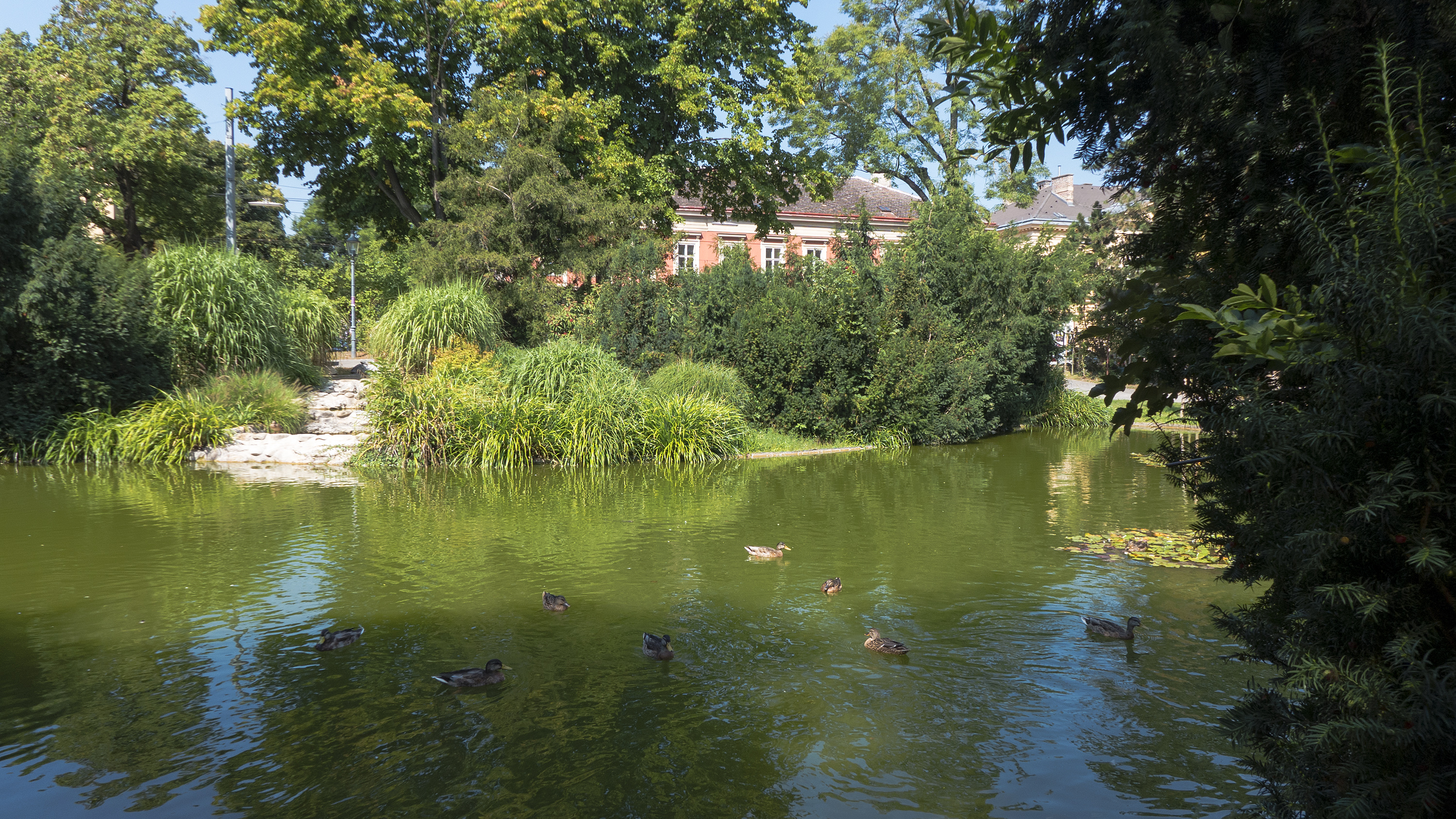 Maurer Rathauspark in Wien 23